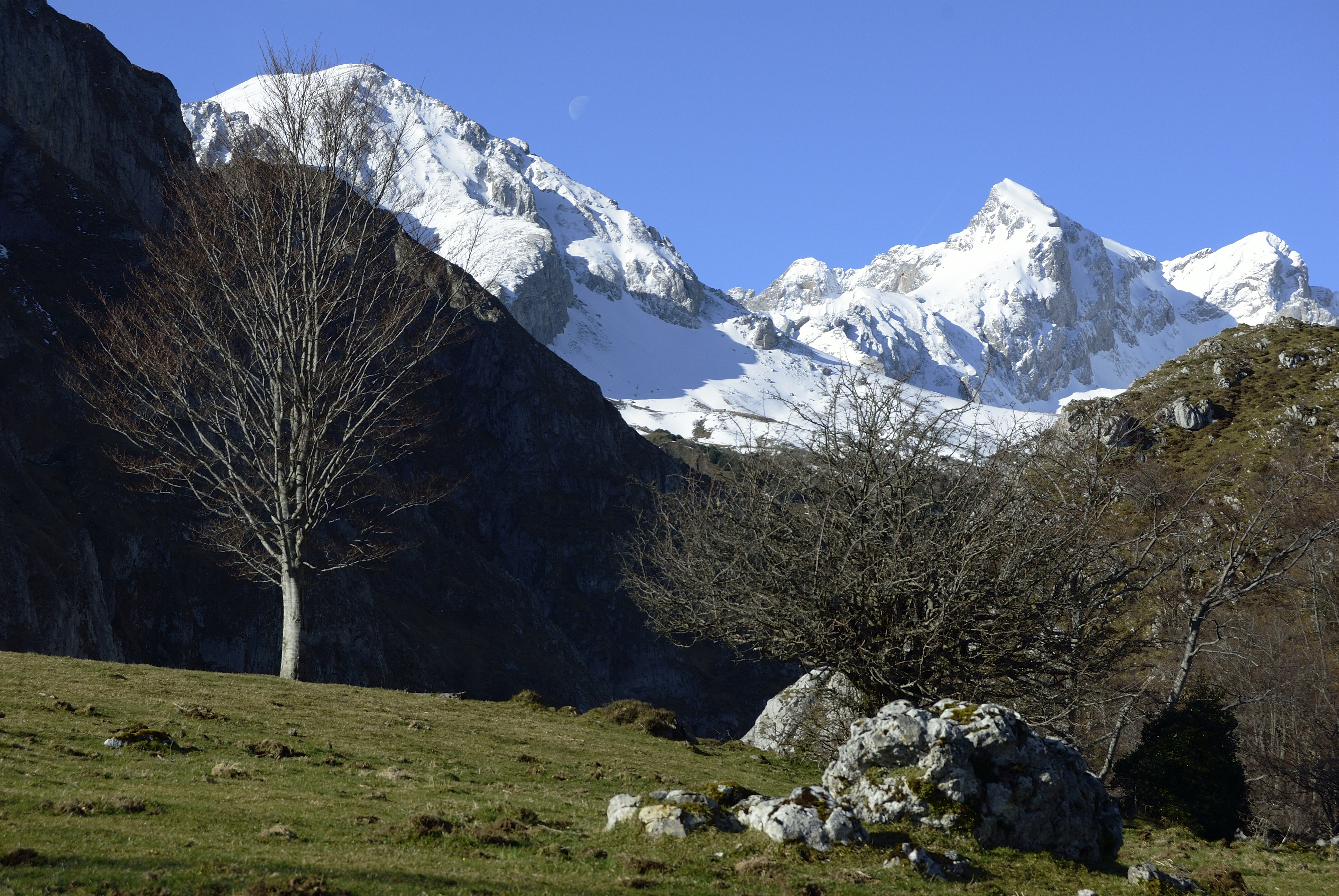 Quirós, Asturias, Spain